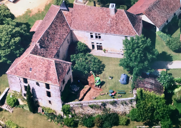 chateau